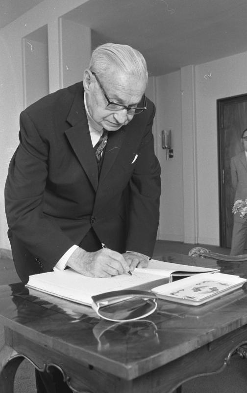 Bundespräsident Heinemann empfängt Prof. Dr. Weichmann, ehemaliger Bürgermeister der Freien- u. Hansestadt Hamburg